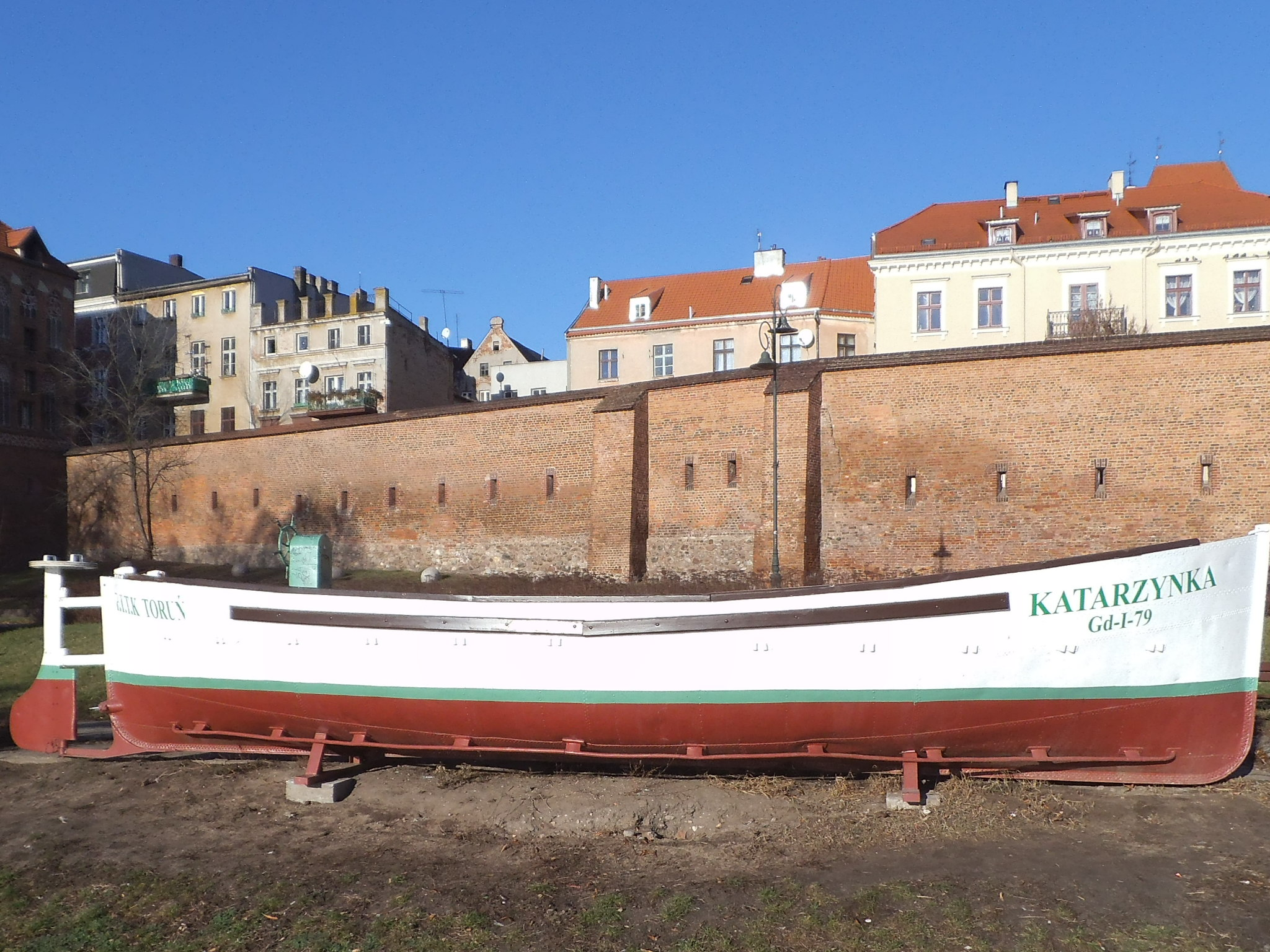 Łódka Katarzynka – łącząca Bulwar Filadelfijski z Kępą Bazarową i Zamkiem Dybowskim